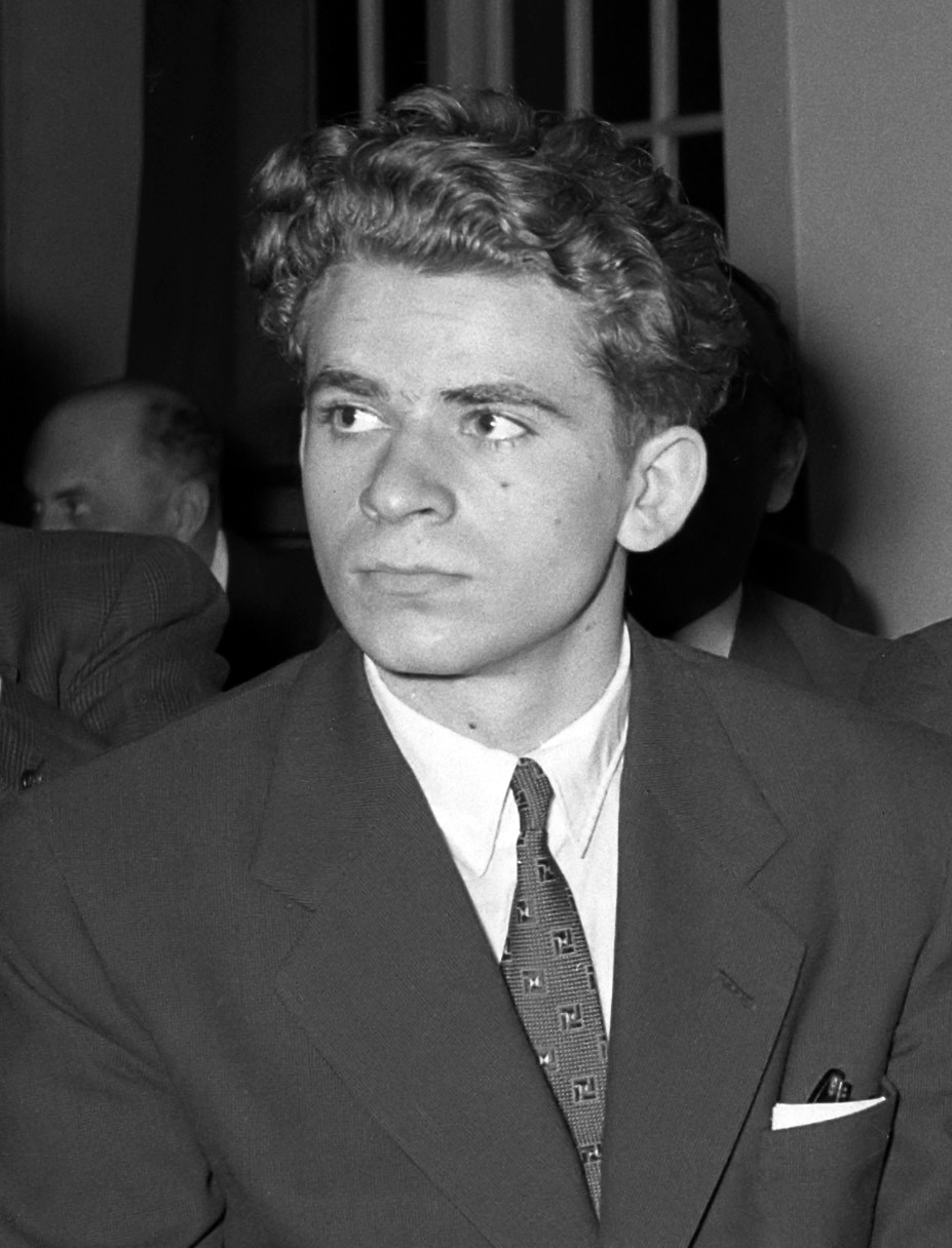 Loting Wereldschaakkandidatentoernooi Amsterdam 26 maart 1956